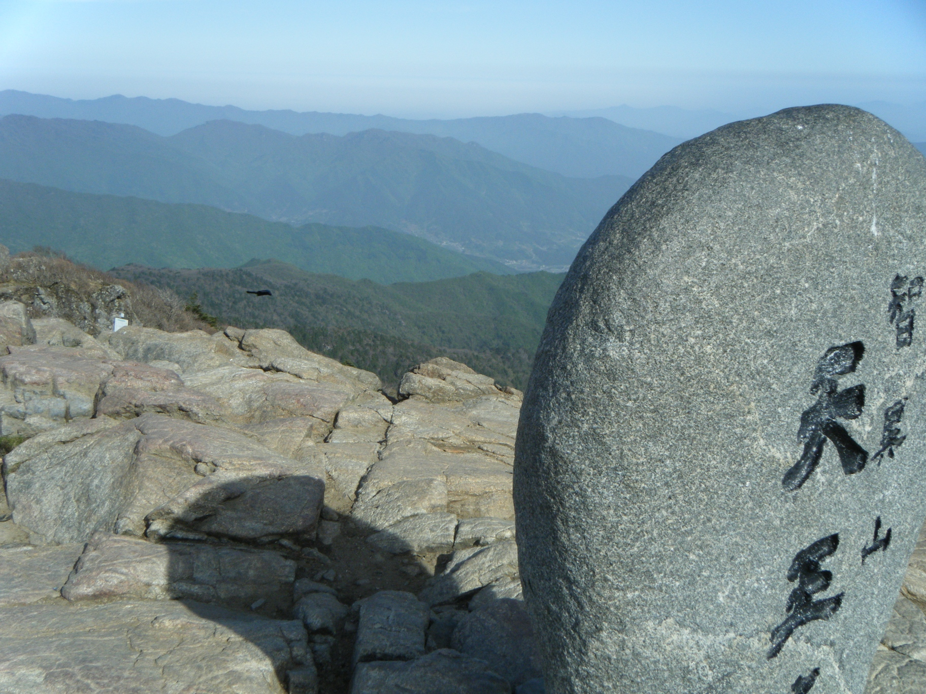 Jirisan peak